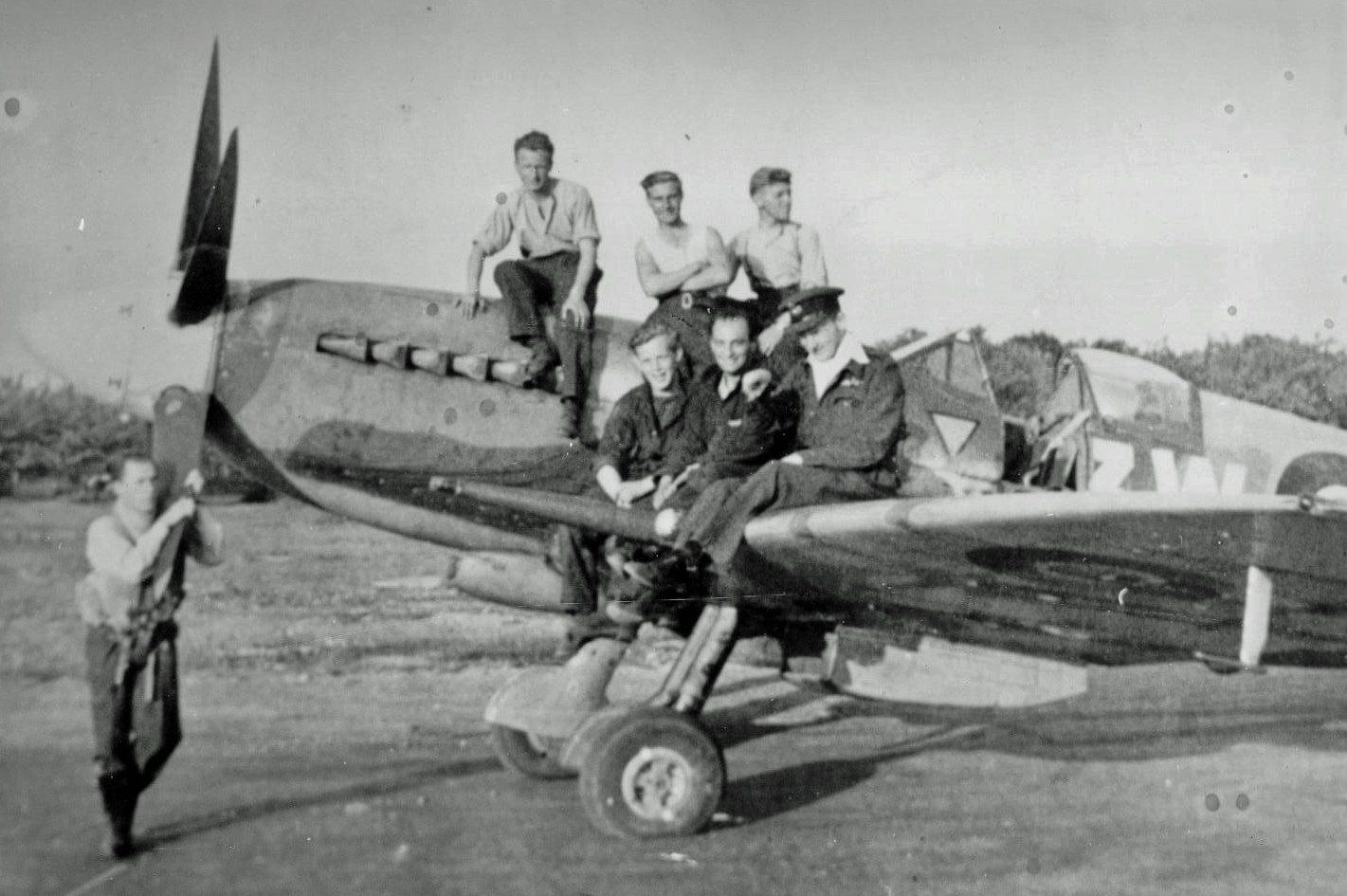 Rudy Burgwal bij een Spitfire